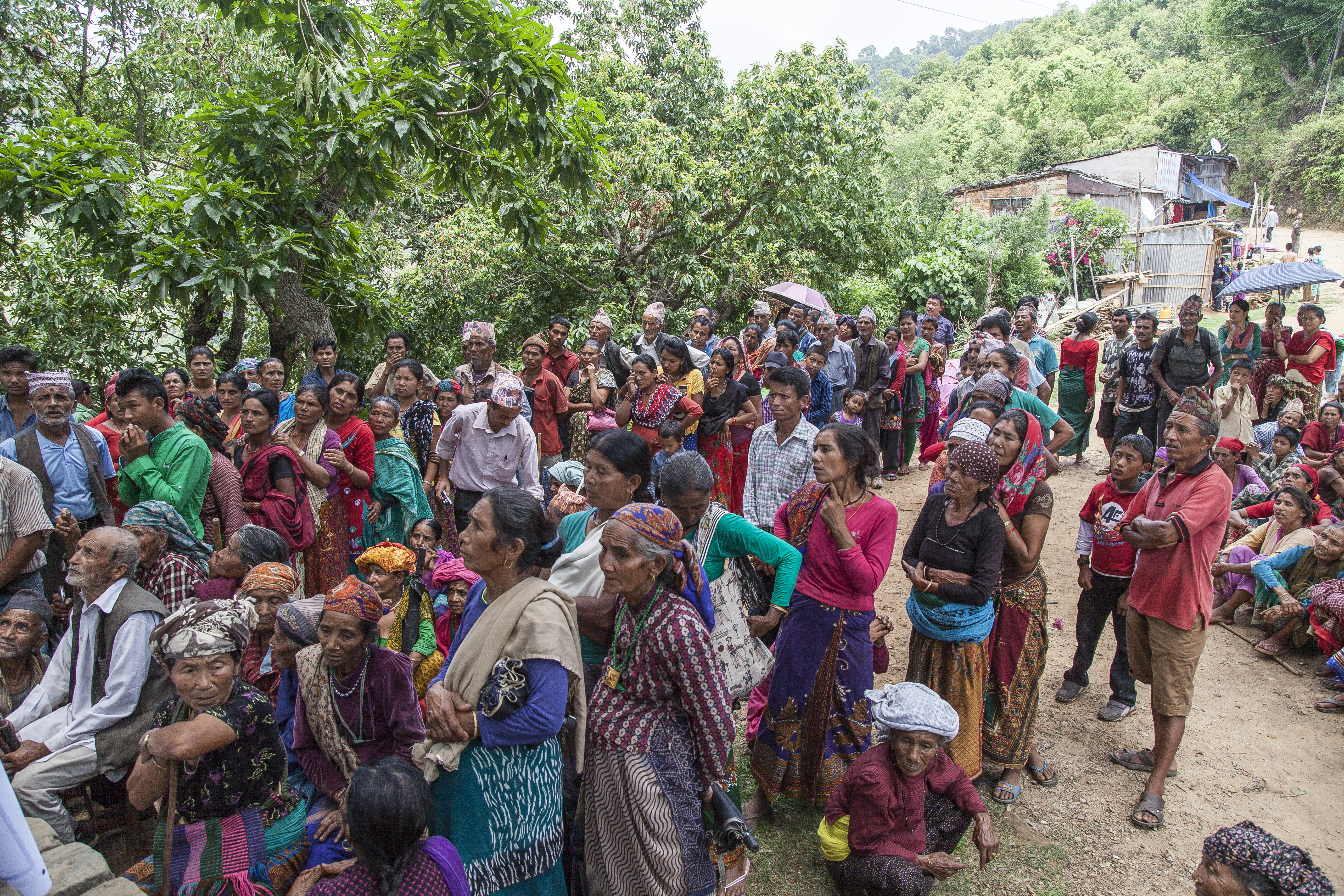 Wartende Patienten vor dem Amppipal Hospital in Nepal